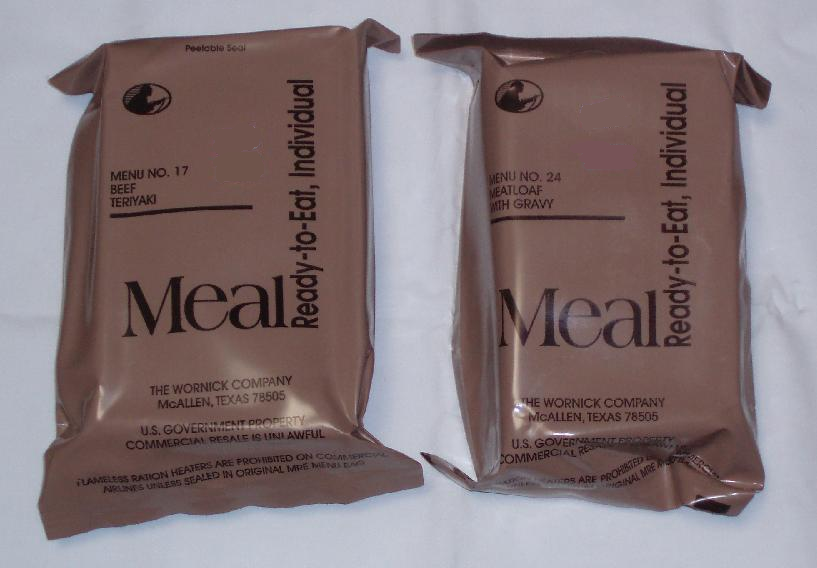 MRE 2003